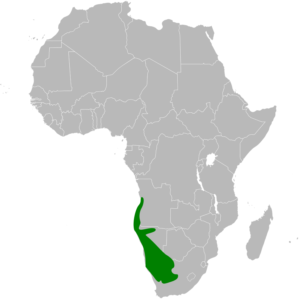 Spizocorys starki distribution map; using BlankMap-Africa.svg, based on